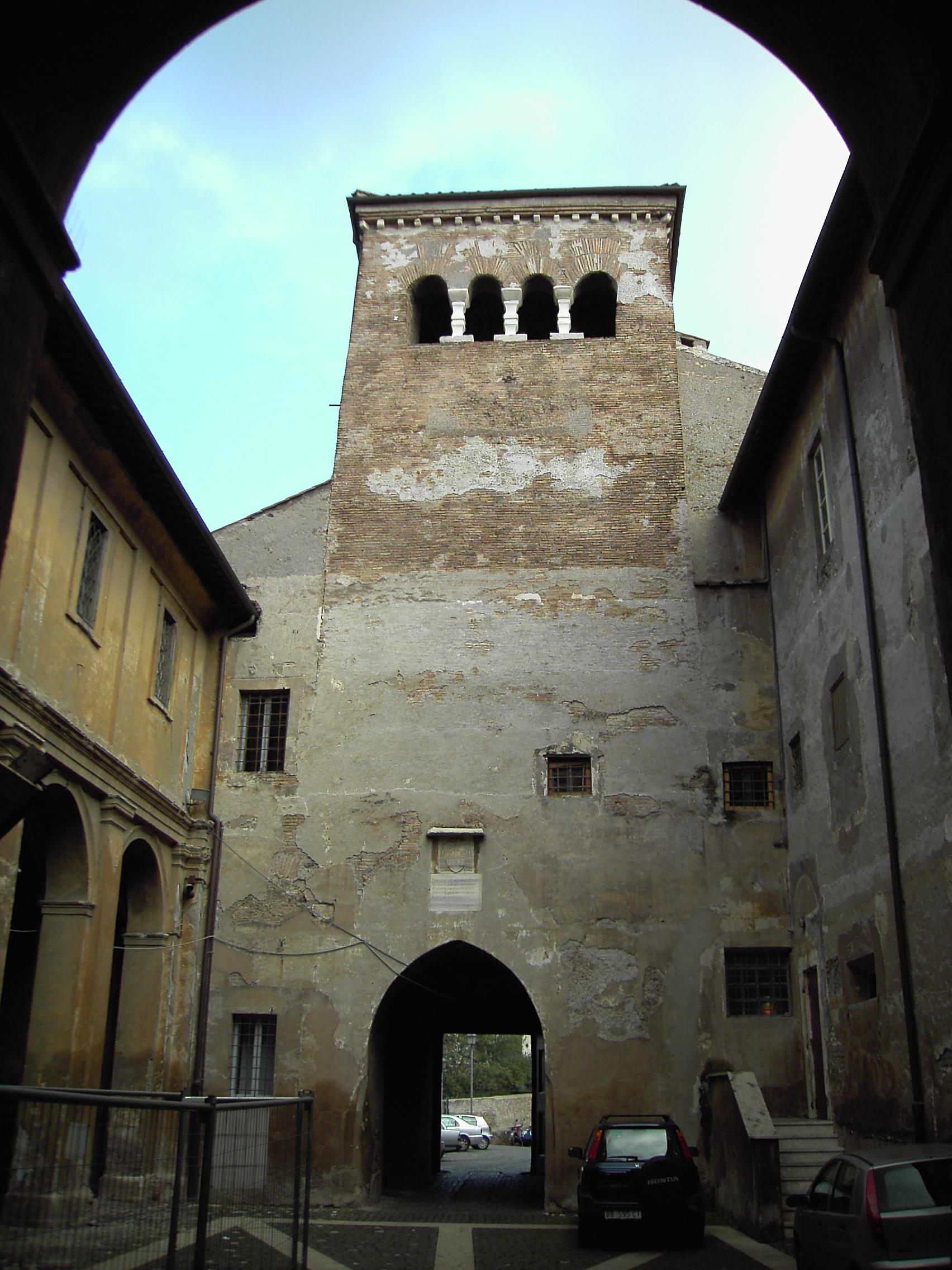 Roma, Basilica e Monastero dei Santi Quattro Coronati: la torre d'ingresso dal primo cortile.